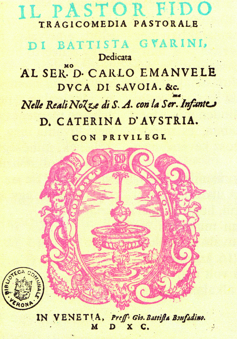 Guarinis's Il pastor fido (1590) pastoral tragicomedy. Cover page. Publisher: Giovanni Bonfadino, Venice, 1590.